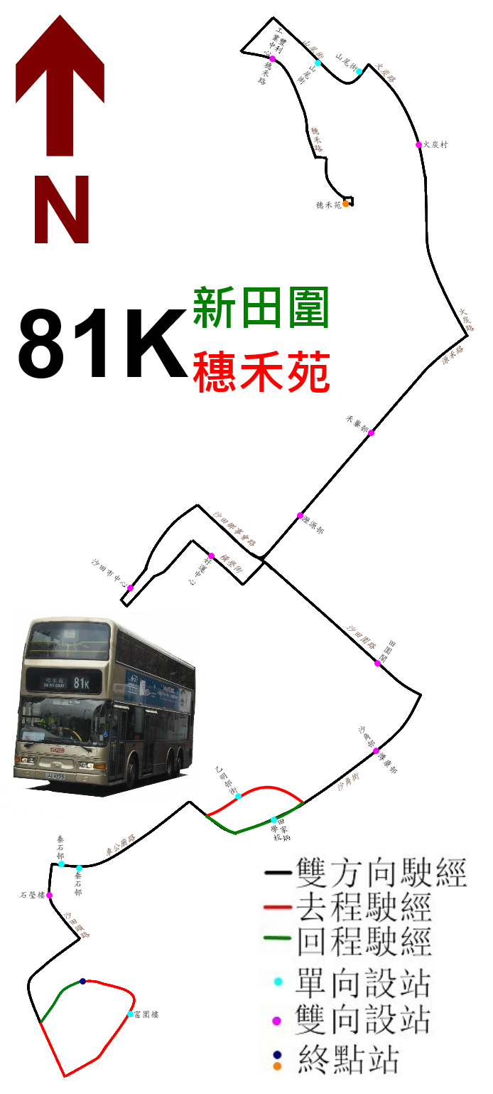 中文（香港）: 九巴81K線的走線圖